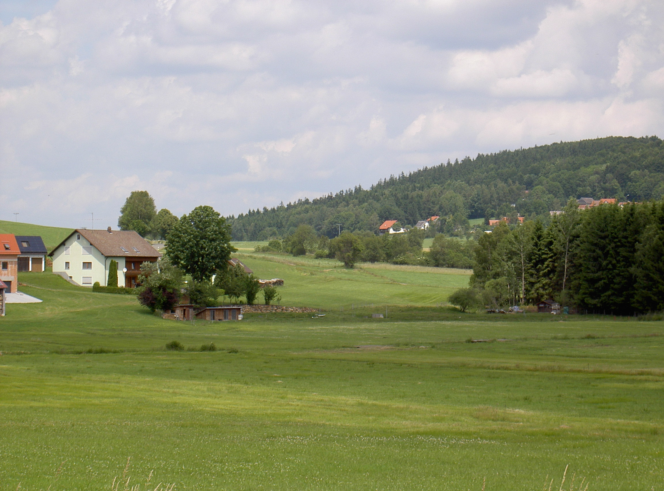 Friedrichshäng